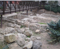 La vil·la de la burguera